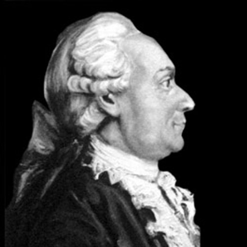 Louis François, marquis de Monteynard (1713-1791), maréchal de France